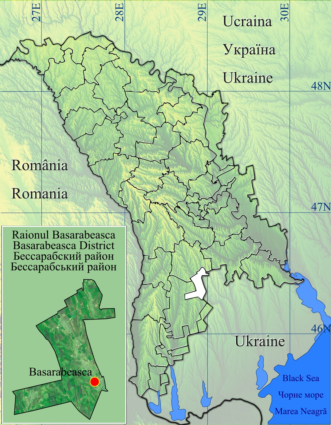 Harta de localizare a raionului Basarabeasca din Republica Moldova. Geographic limits of the map : Left : 26.5 E Right : 30.5 E Top : 48.75 N Bottom : 45.25 N